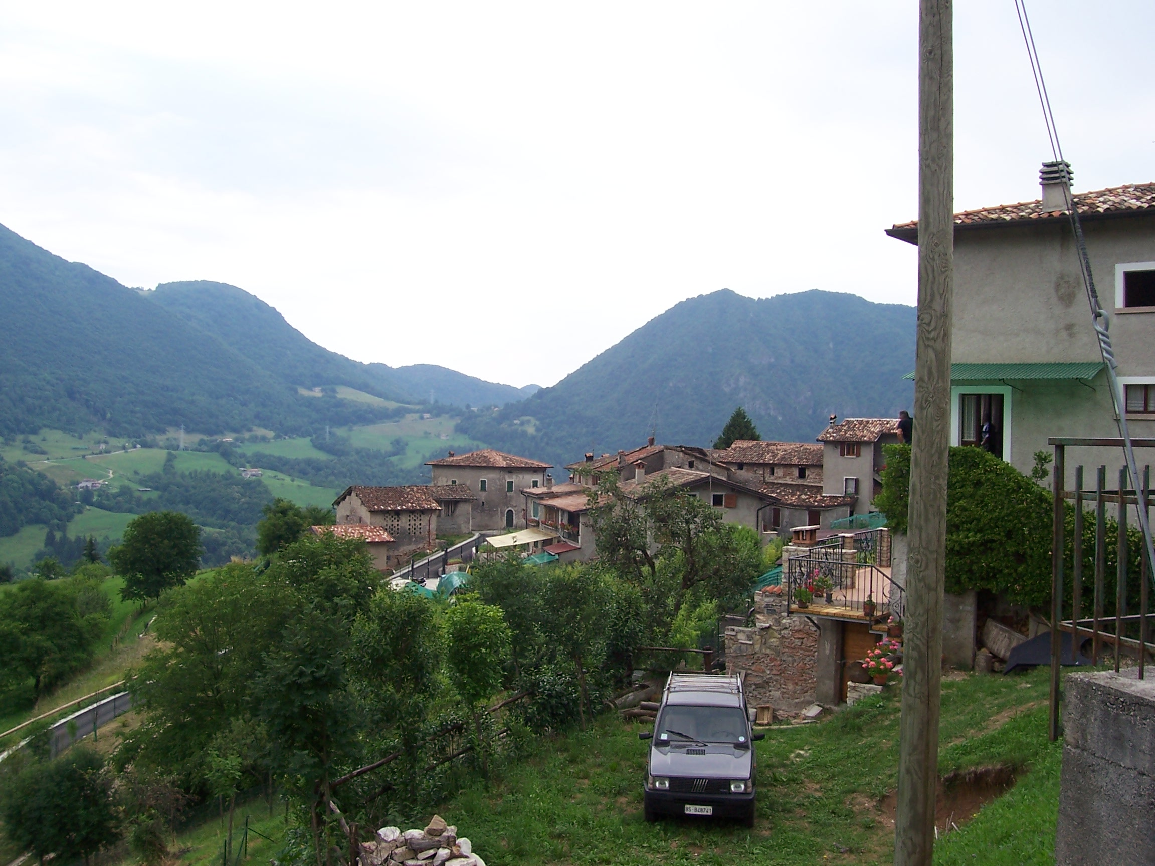 Costa di Gargnano (brescia)